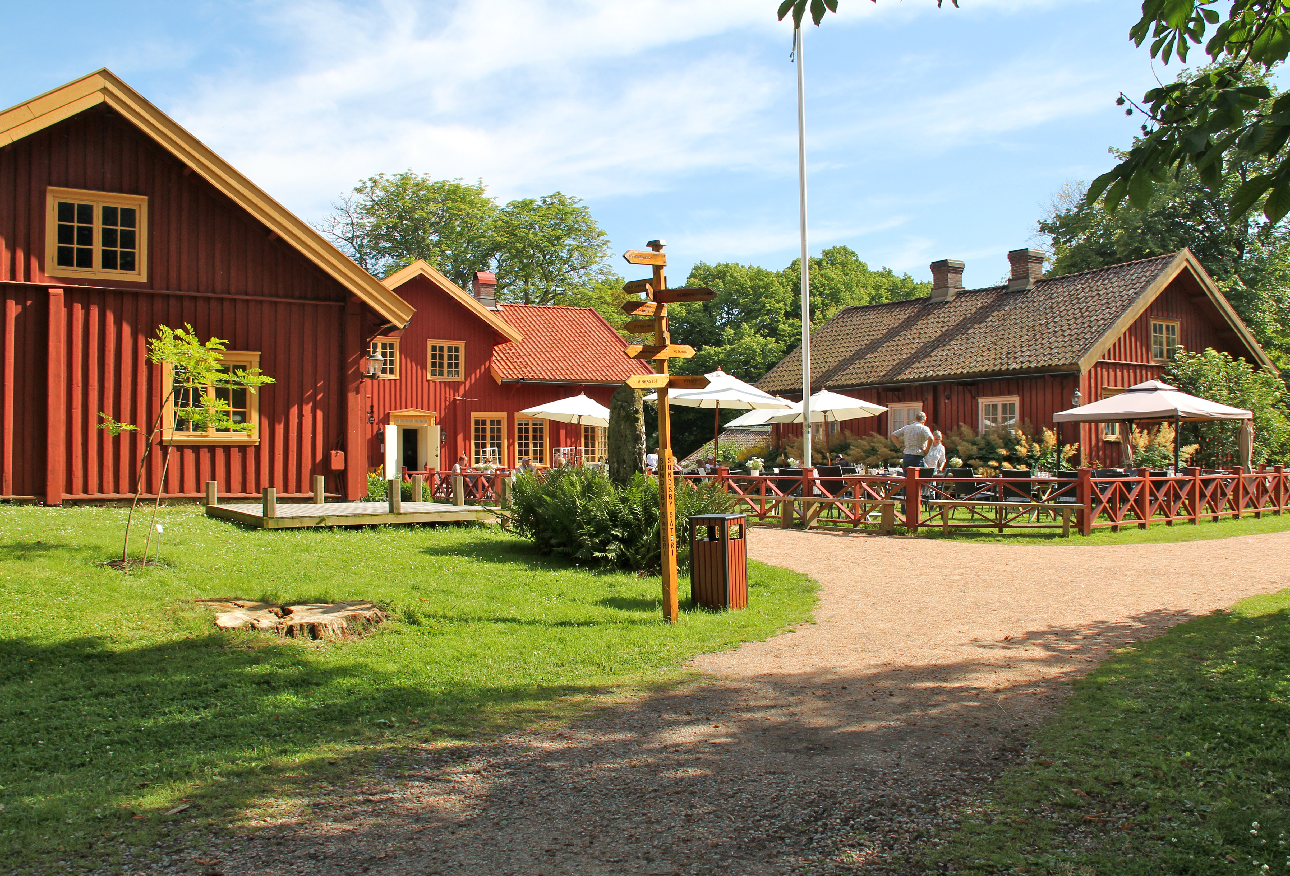 Sundsby säteri (Sundsby 2:77 f.d. Sundsby 2:1)